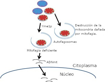 Mecanismo de inserción de ADN mitocondrial en el núcleo de una célula eucariota (o numtogénesis), dando lugar a NUMT (nuclear mitochondrial DNA segment). La mitofagia es un mecanismo que controla la calidad de las mitocondrias en la célula mediante la degradación de las disfuncionales. La alteración de la mitocondria por una mutación en Yme1 produce la acumulación de ADNmt no digerido en el citoplasma que finalmente se inserta en el núcleo, proceso conocido como numtogénesis.